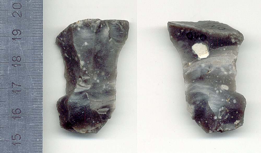 Rdeń